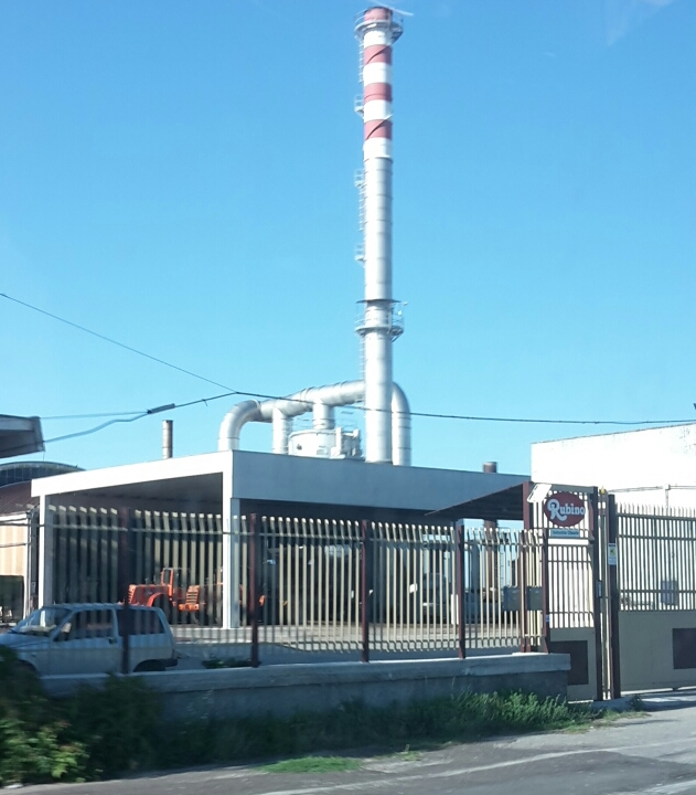 Esempio di oleificio in cui si produce olio lampante. Dalla ciminiera fuoriesce il vapore acqueo prodotto separando l'olio dall'acqua.